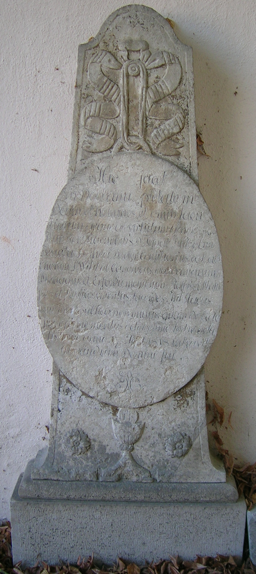 Grabstein von Ignaz Pickel an der Friedhofskapelle Maria Schnee im Ostenfriedhof Eichstätt